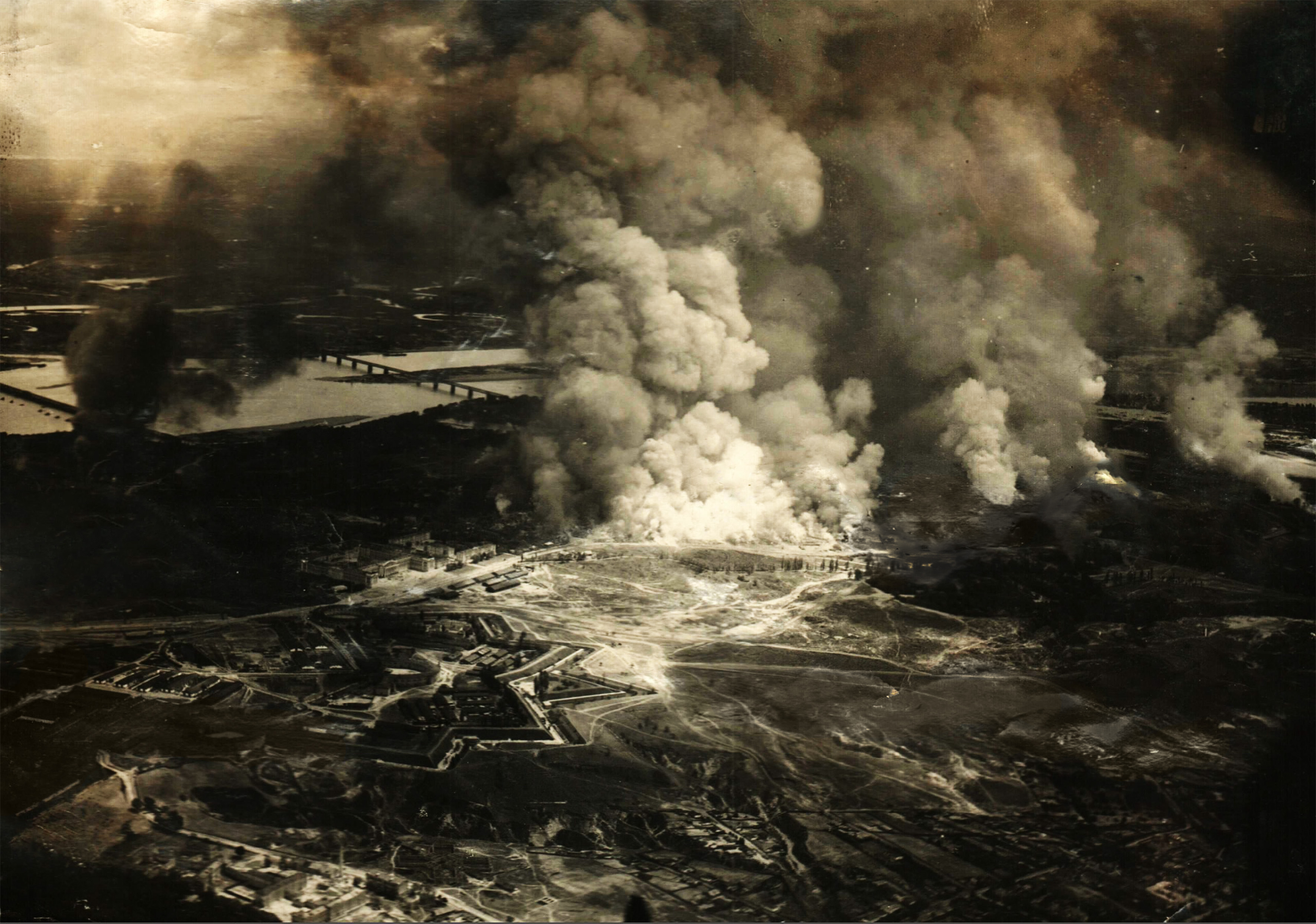 Вибух артилерійських складів і пожежа на Звіринці 1918.